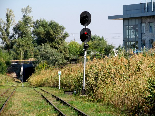 Входной светофор на станцию Жовтнева